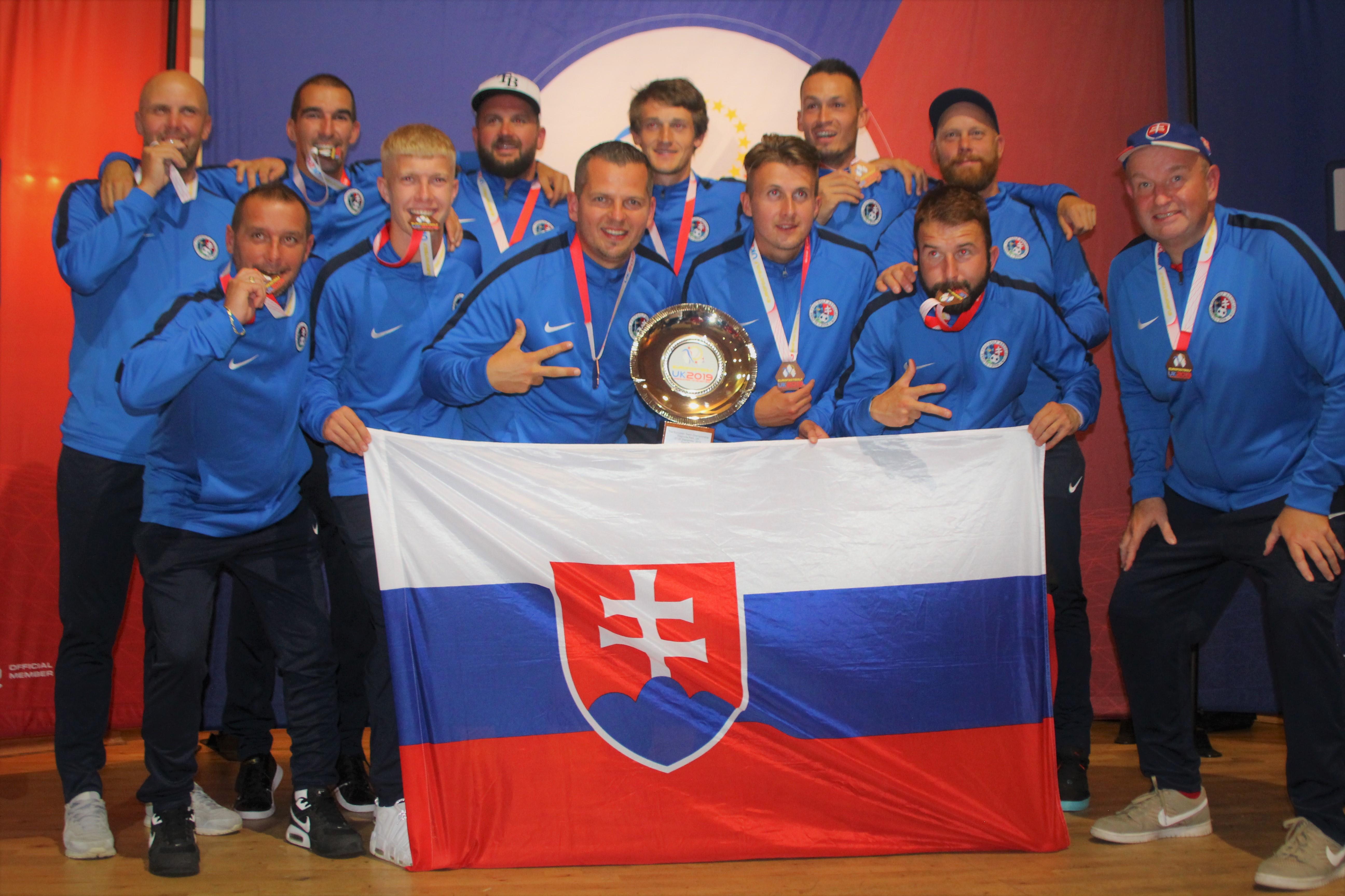 Team FootGolf Slovensko s pohárom za 3. miesto a s bronzovými medailami.